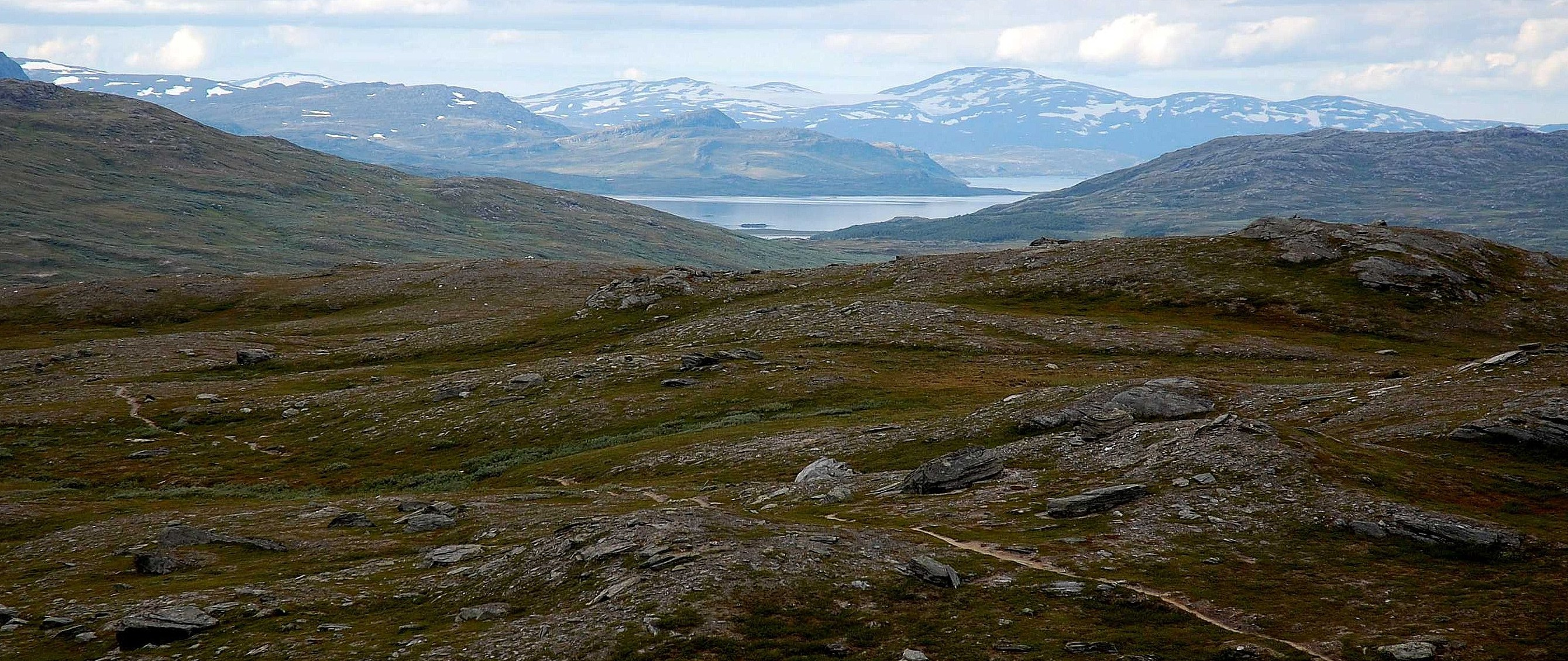 padjelantaleden